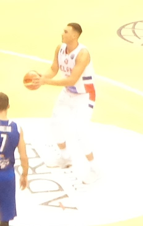 Match de Ligue des Champions de basket-ball (saison 2017-2018) entre l'Elan Chalon et Klaipėdos Neptūnas au Colisée de Chalon-sur-Saône.